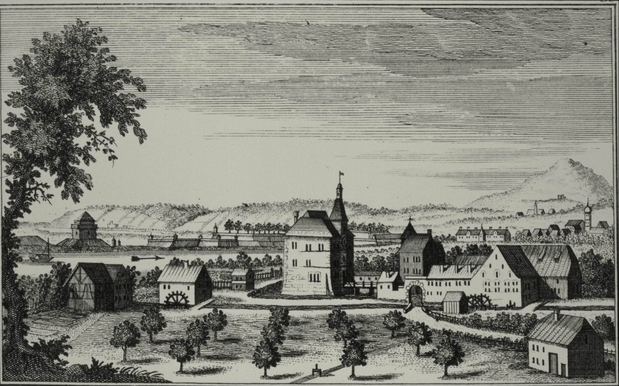 Schloss Klybeck von Süden gesehen. Erschienen in der Topographie der Eydgnoßschaft von David Herrliberger 1754. Der Stich zeigt mehrere interessante Details aud der rheinabwärts gelegenen Umgebung vom Basel. Das Weiherschloss Klybeck und seine Wirtschaftsgebäude. Im Vordergrund erkennt man einen Obstgarten, dahinter verläuft der Klybeckteich, der die Wasserräder der Sägereien und Mühlen der Gewerbebetriebe antreibt. Vom Teich zwweigt ein Bewässerungskanal mit Stellfalle für den Obsgarten im Vordergrund ab. Im linken Bildteil erkennt man jenseits des Rheins die Festungsanlage von französisch Hüningen, dahinter erstreckt sich der Höhenzug des Isteiner Klotzen. Im Hintergrund der Bildmitte blickt man auf das Untere Klybeck und das Dorf Kleinhüningen bei der Wiesenmündung. Am rechten Bildrand erhebt sich der Badenweiler Blauen mit der Sausenburg und darunter das Dorf Ötlingen auf dem Tülinger Berg.